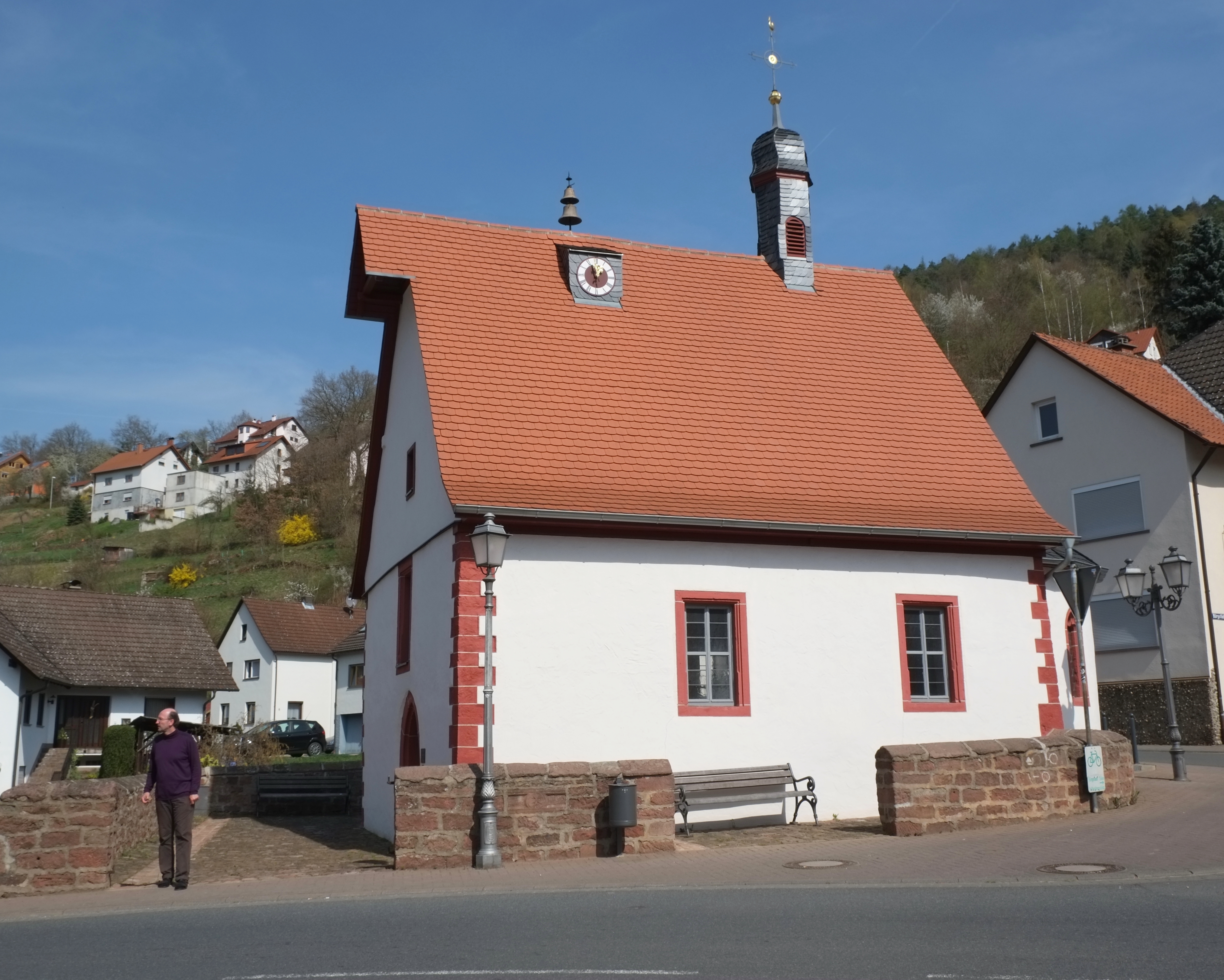 Katholische Kapelle St. Valentin in Eichenbühl im Landkreis Miltenberg (Bayern, Deutschland)